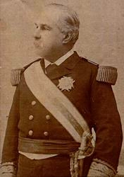 Almirante De la Cámara Livermore